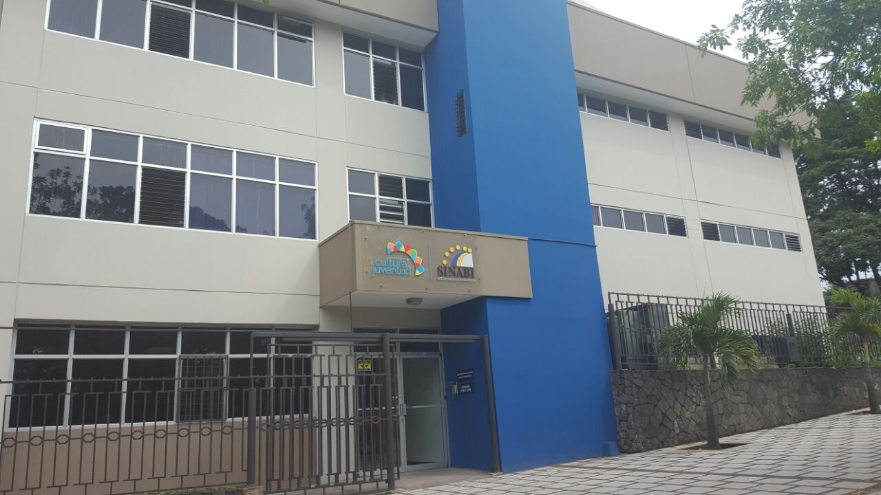 Fachada del Sistema Nacional de Bibliotecas, SINABI-MCJ, C.R.